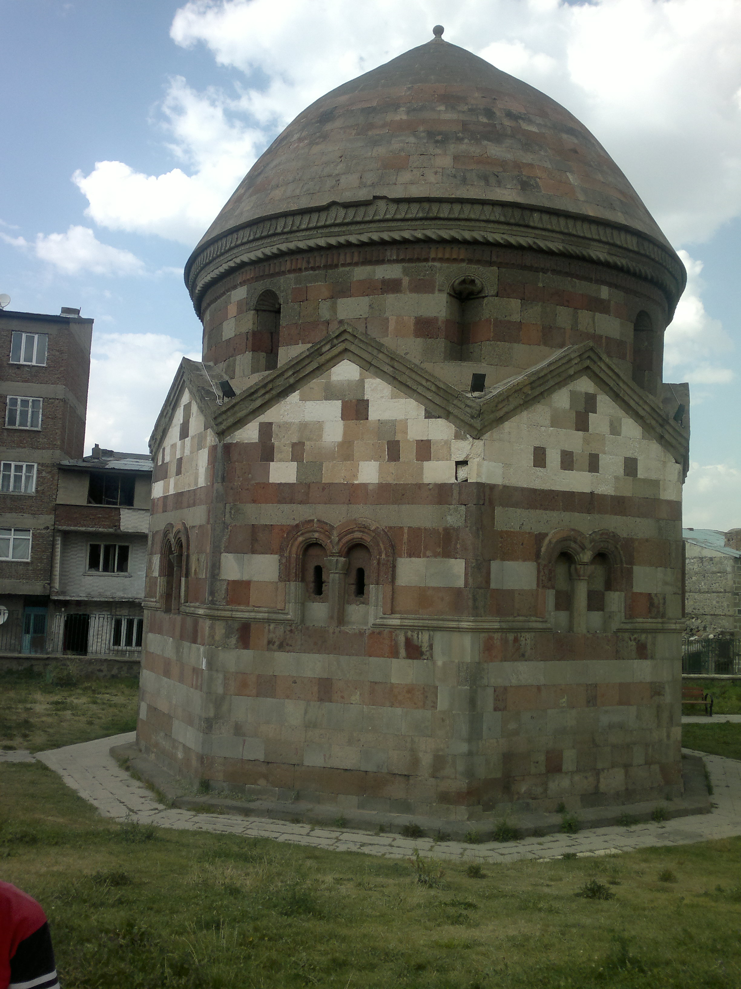 Türkiye'de Erzurum ili şehir merkezinde bulunan 12. yüzyıl Saltuklu dönemi Emir Saltuk Kümbeti.